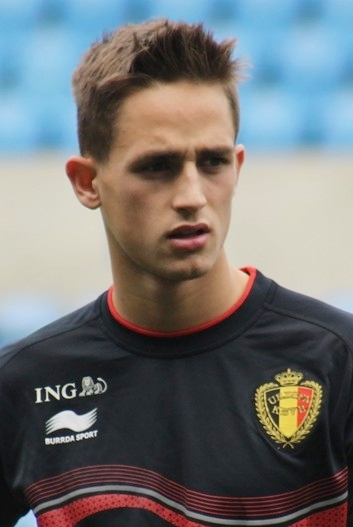 Adnan Junuzaj during a training session with the belgian red devils